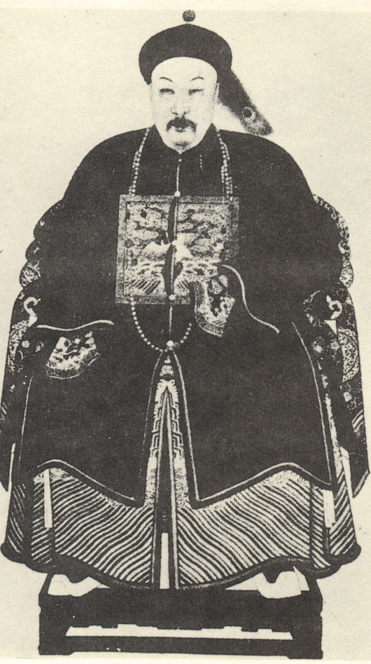 宗室耆英